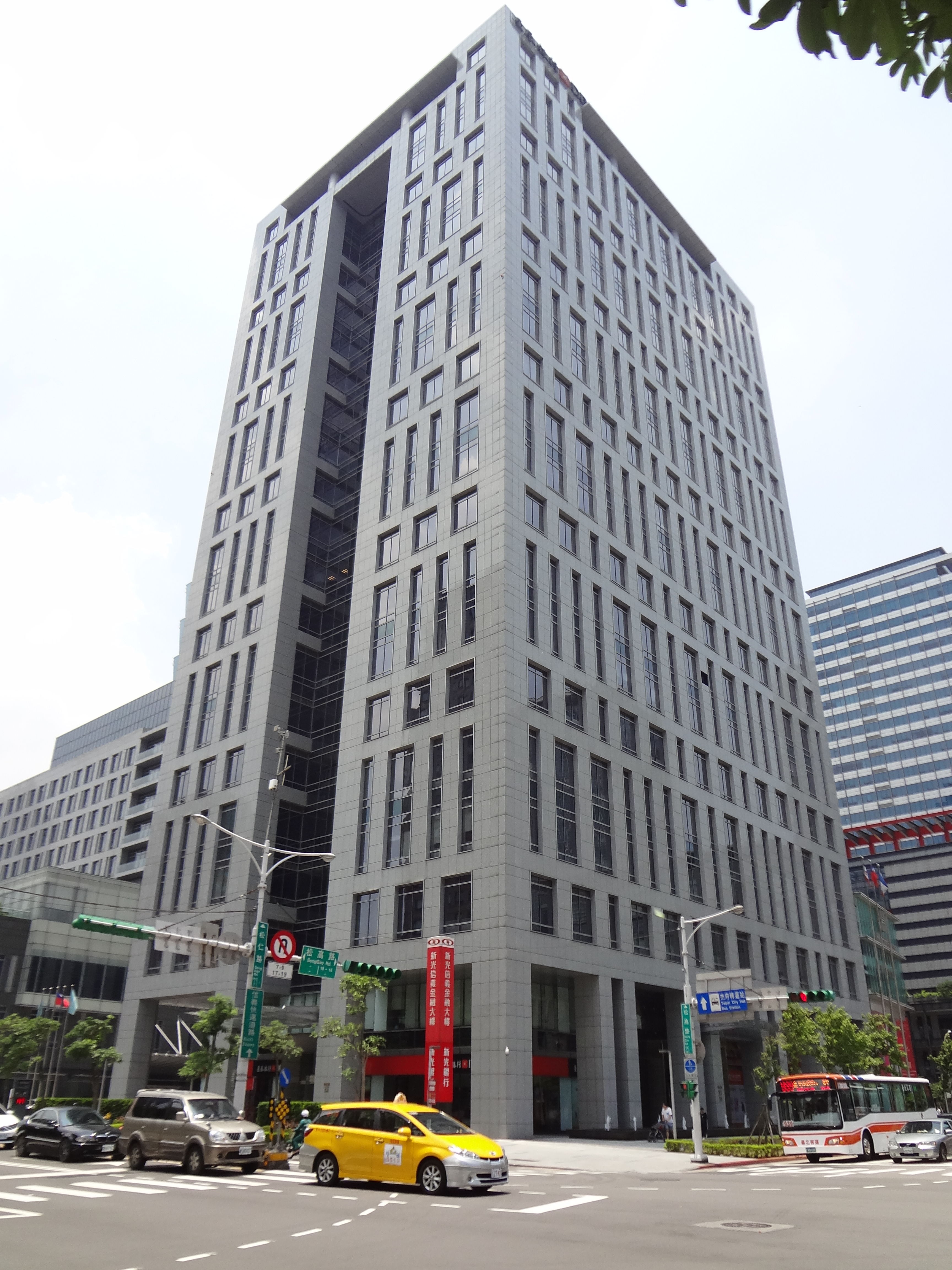 新光信義金融大樓，位於臺北市信義區松仁路、松高路口，為臺灣新光商業銀行總行所在地。